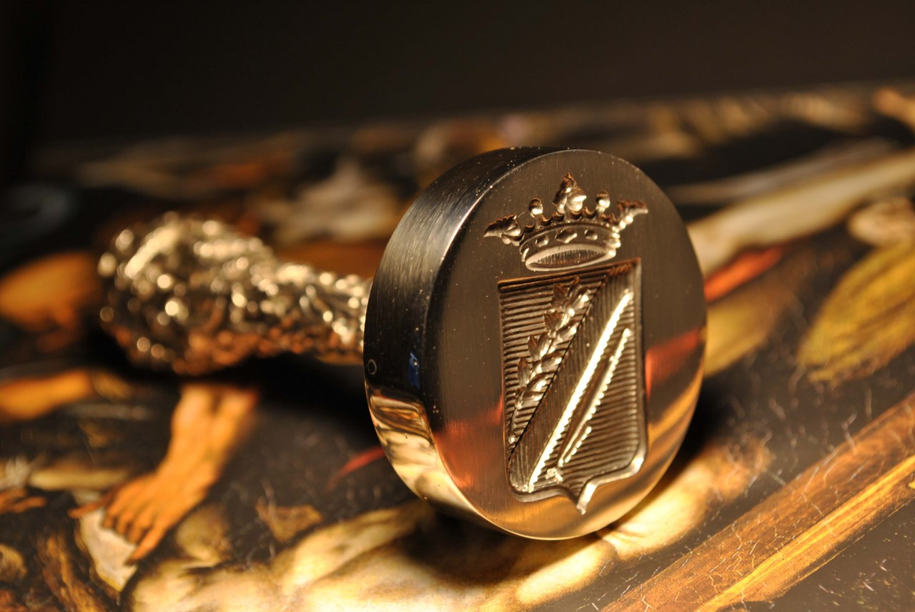 Sceau en argent ciselé à la main de la famille Ciciarelli de Cicerello